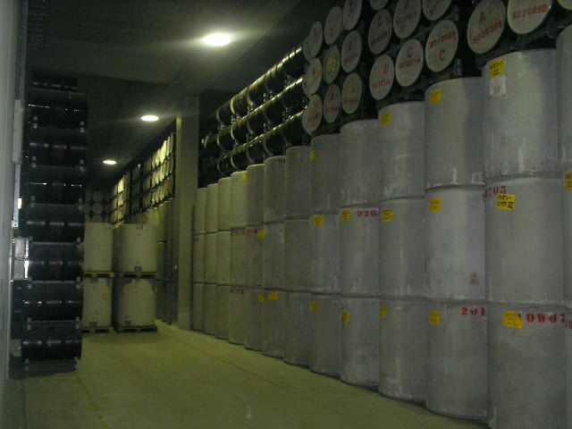 Covra, de opslagplaats voor radioactief afval, gefotografeerd op een excursie